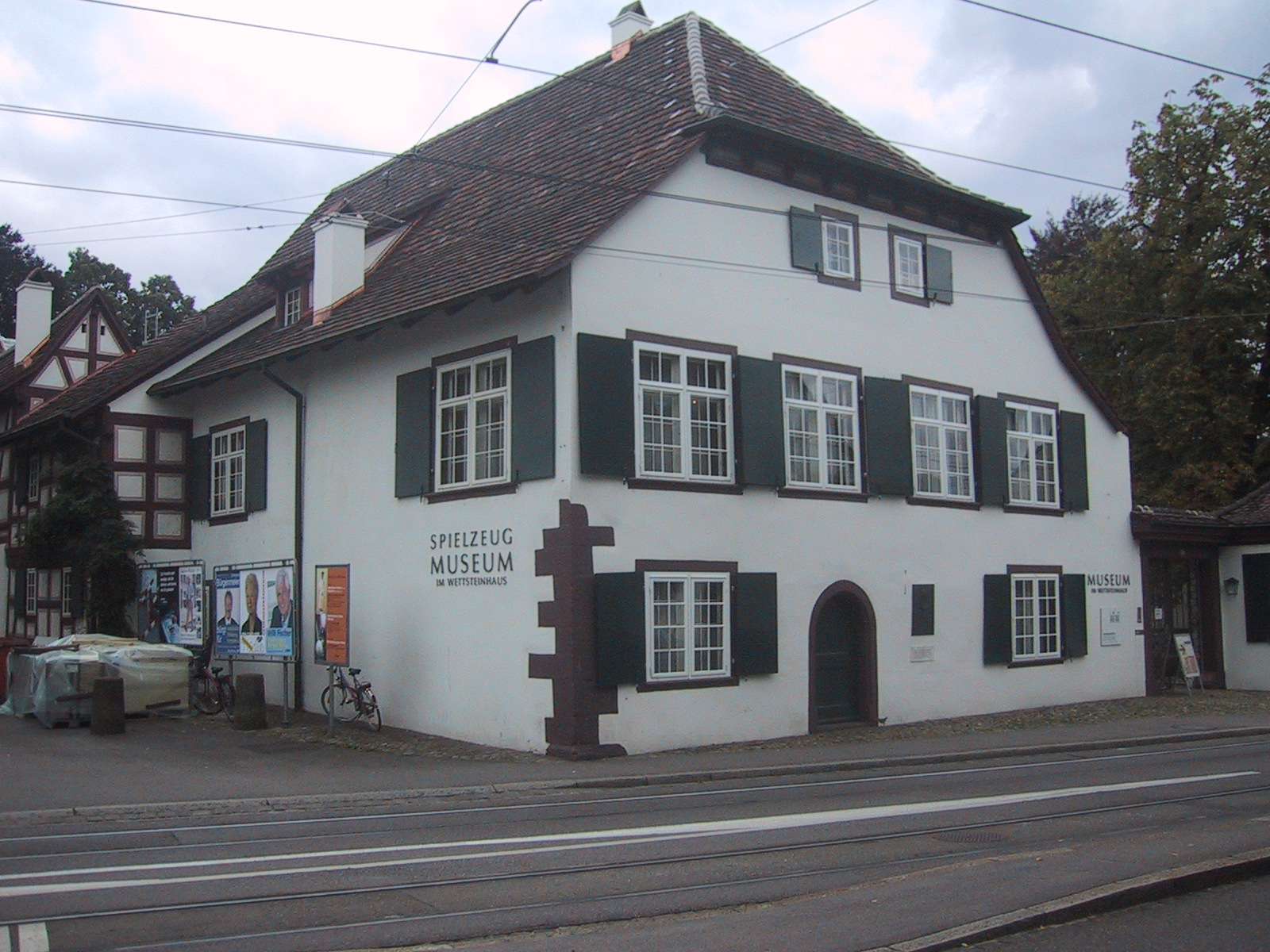 Aufnahme 18. September 2005, Spielzeugmuseum von Riehen, Kanton Basel Stadt. Fotograf Peter Berger (selbst fotografiert). Lizenzstatus "GNU-FDL" Öffnungszeiten des Museums: Täglich ausser Dienstag 11 - 17 Uhr. Details: (Angaben der Museumsleitung)